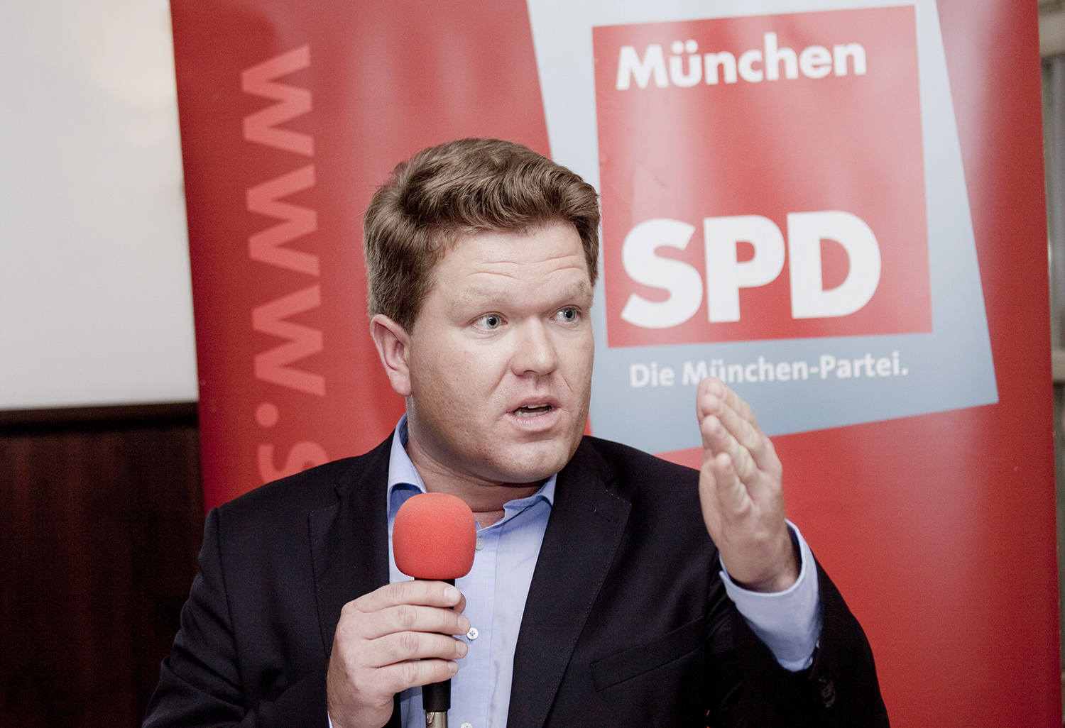 Florian Post bei seiner erneuten Nominierung zum Bundestagskandidaten, 2016